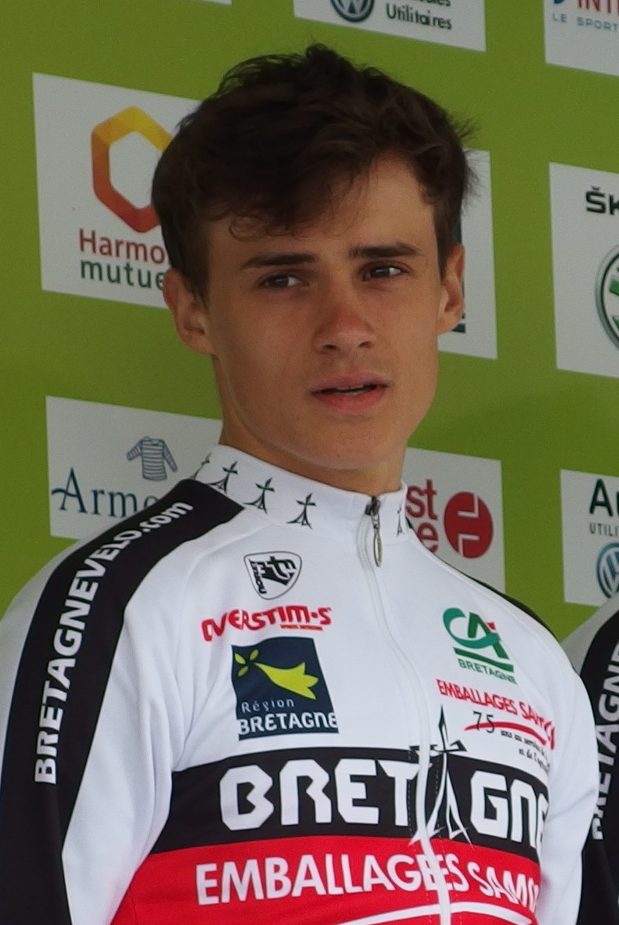 Tour de Bretagne 2015 - Présentation des équipes au départ de la troisième étape à Baud - Équipe Sélection de Bretagne Depicted person: Axel Journiaux